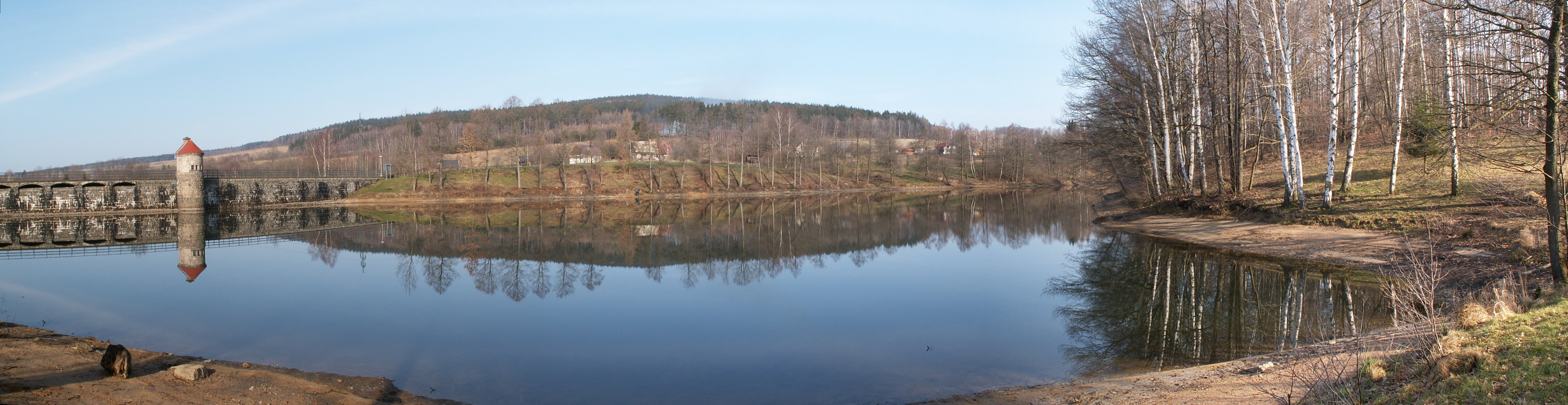 Vodní Nádrž Mlýnice v Nové Vsi u Chrastavy - Panorama od jihu.